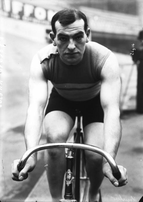 Hourlier-portrait du coureur cycliste sur son vélo